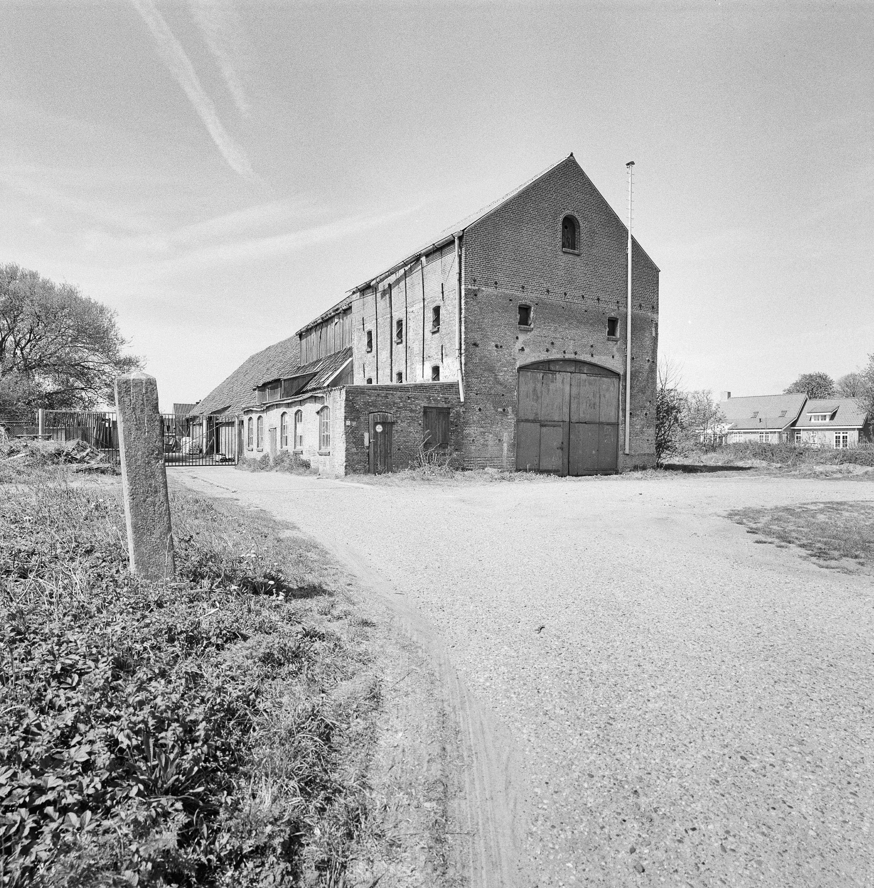 De Onverwacht: Overzicht voorgevel en linker zijgevel meestoof (opmerking: Gefotografeerd voor MIP Zuid-Holland, bladzijde 93)